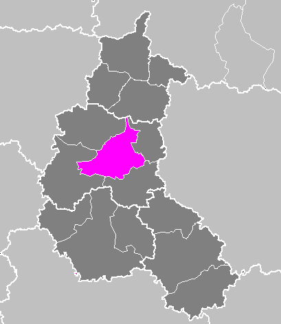 Maps of arrondissements and cantons of France: Arrondissement de Châlons-en-Champagne.PNG